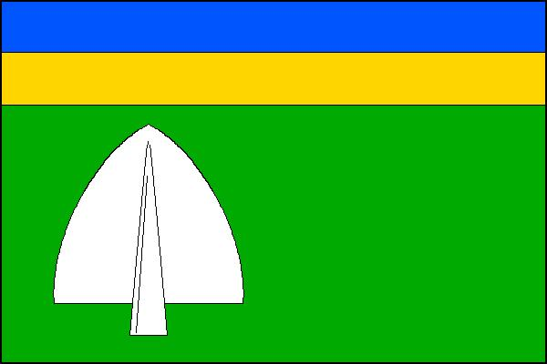 Vlajka obce Šošůvka